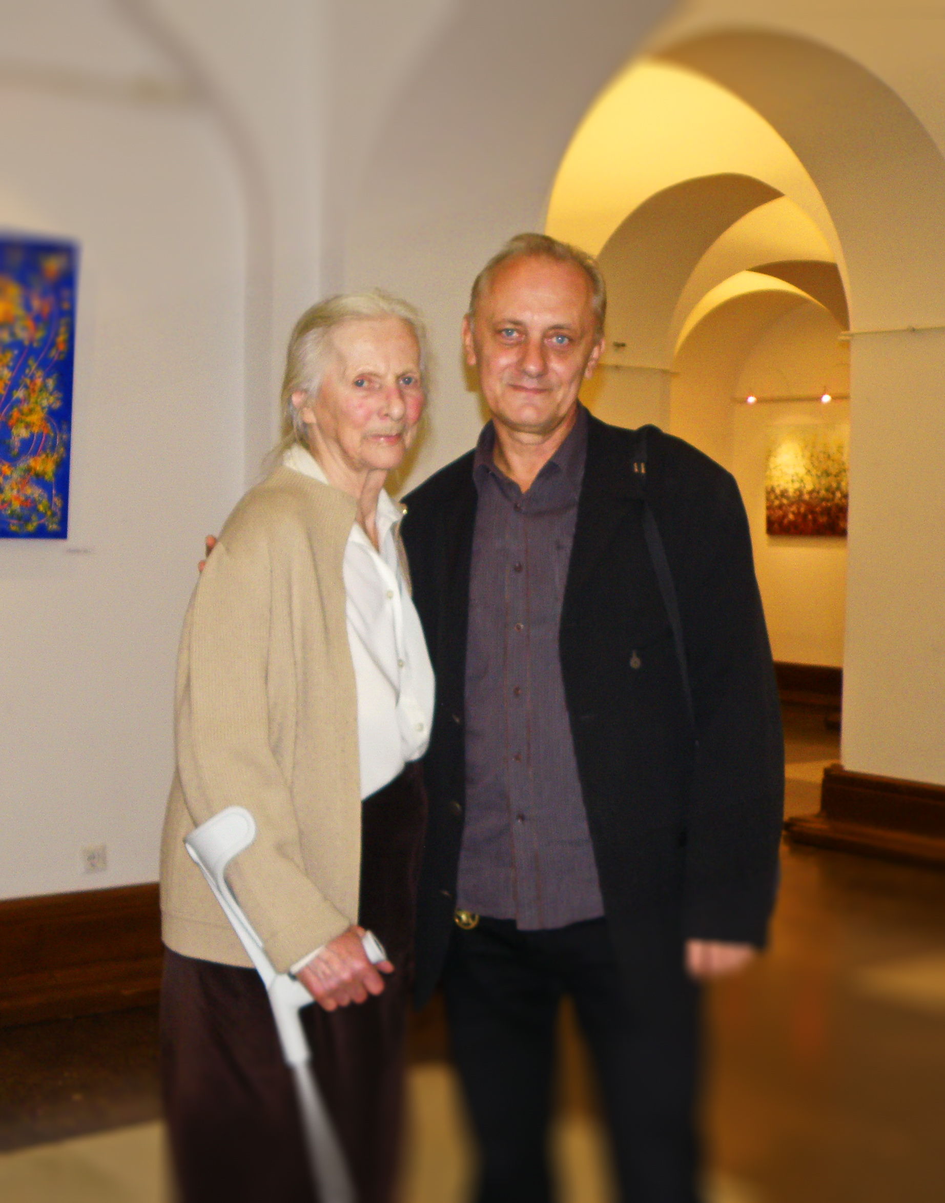 Marija Braut i Miroslav Vajdić